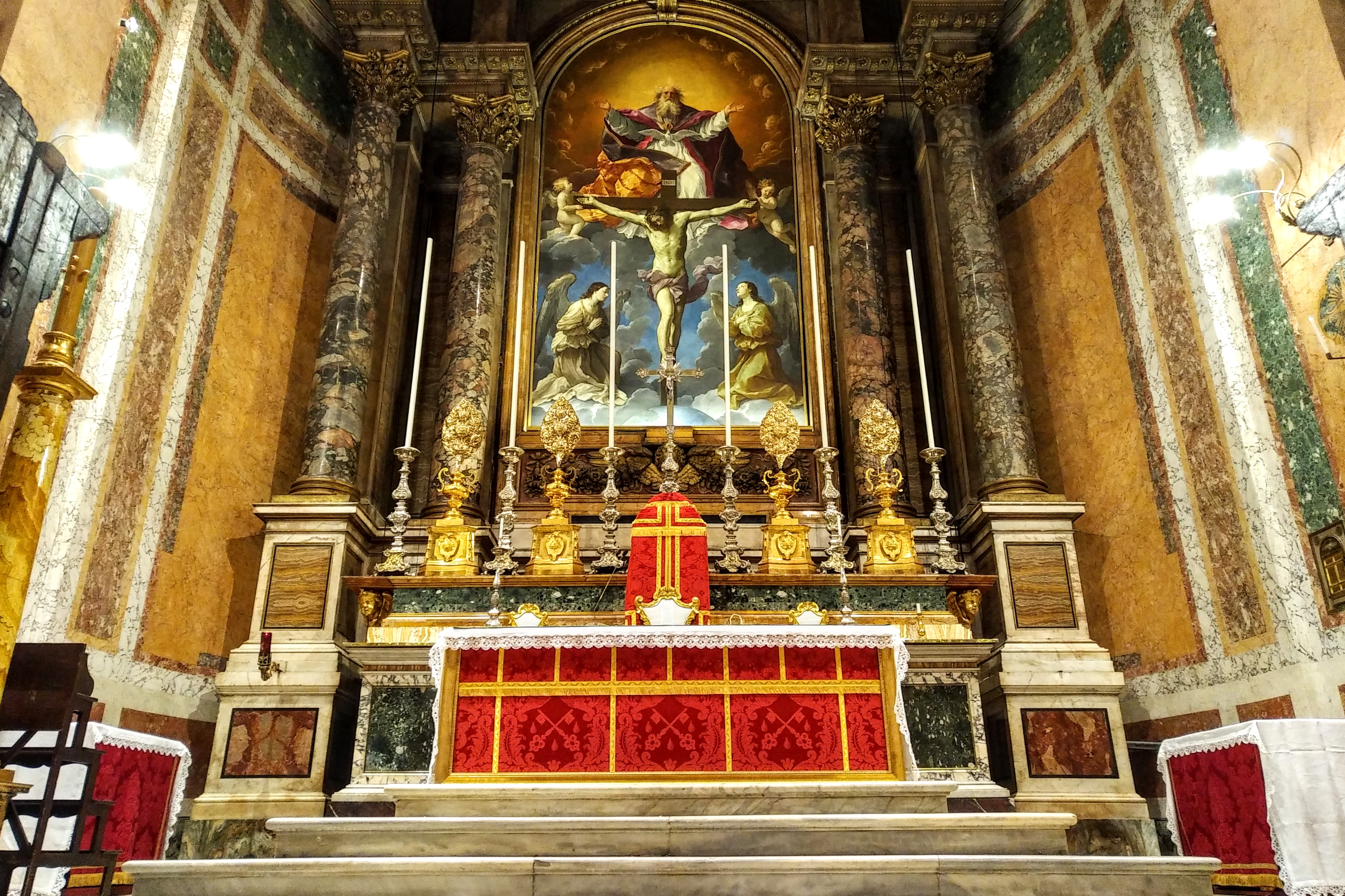 Altare Maggiore - Rosso